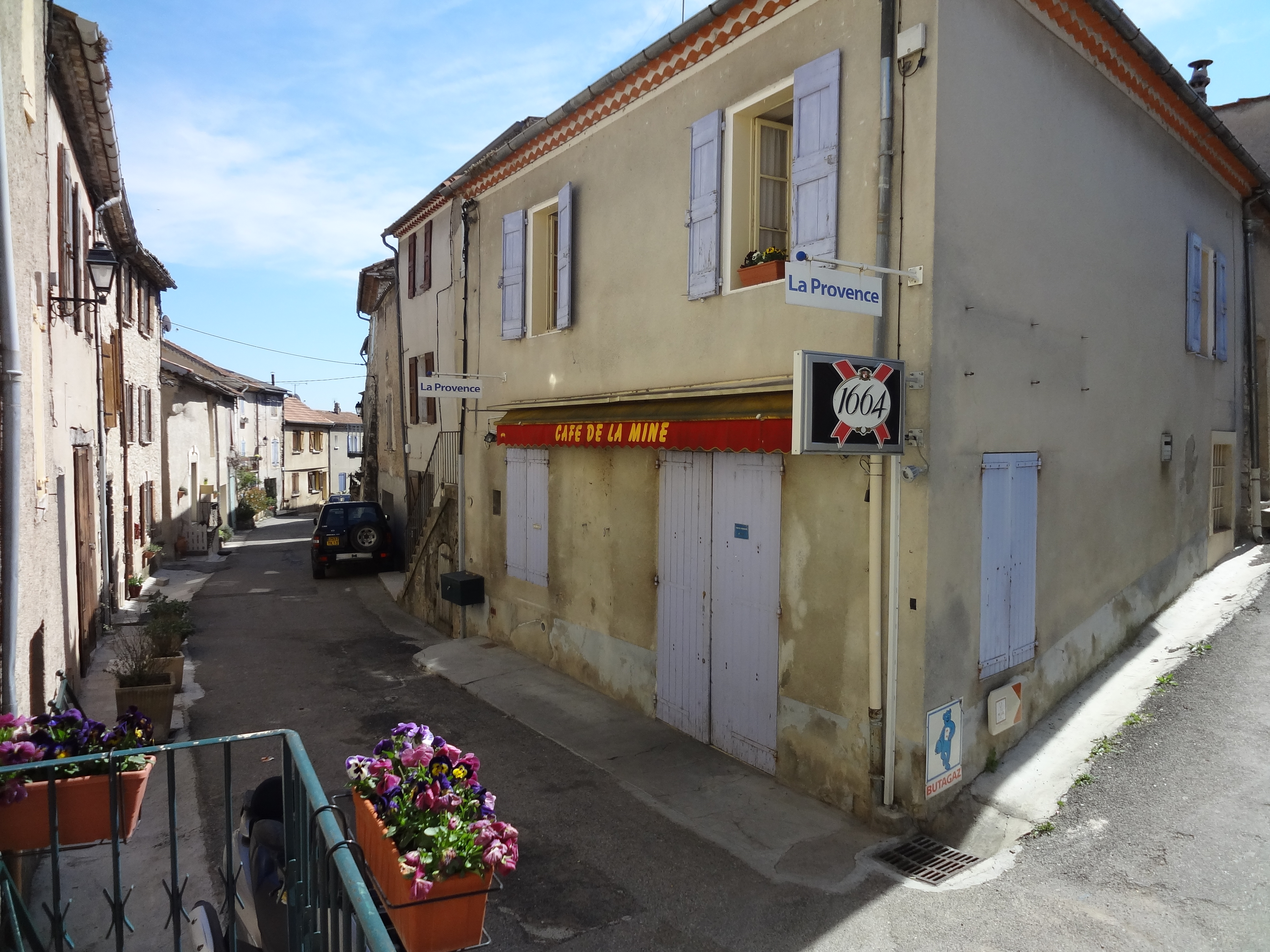 Le bar de la Mine, à Sigonce, maintient le souvenir de la mine de lignite